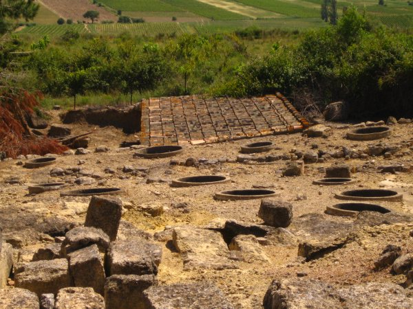 Vu des 72 silos à grains du site de l'oppidum d'Ensérune (France)